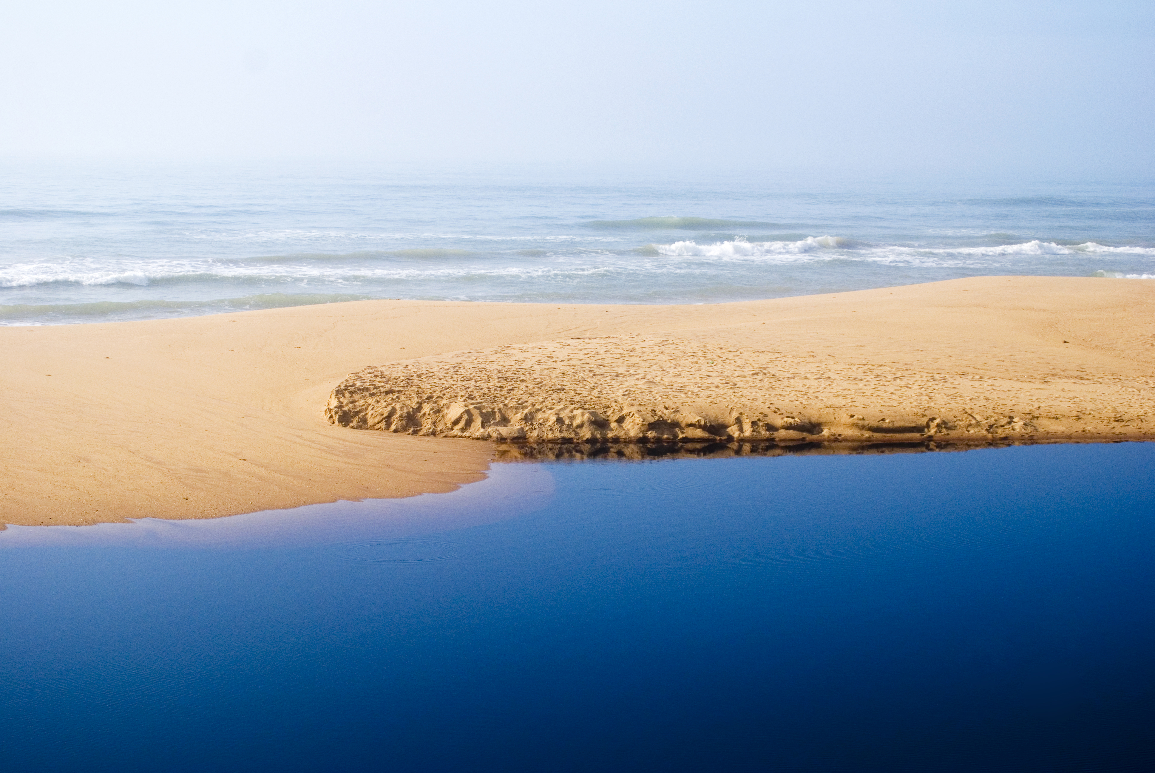 Nesta foto registrada pelo Instituto Últimos Refúgios está a Lagoa de Caraís e a poucos metros está o mar. A lagoa esta localizada no Parque Estadual Paulo Cesar Vinha-ES, e é aberta a visitação!